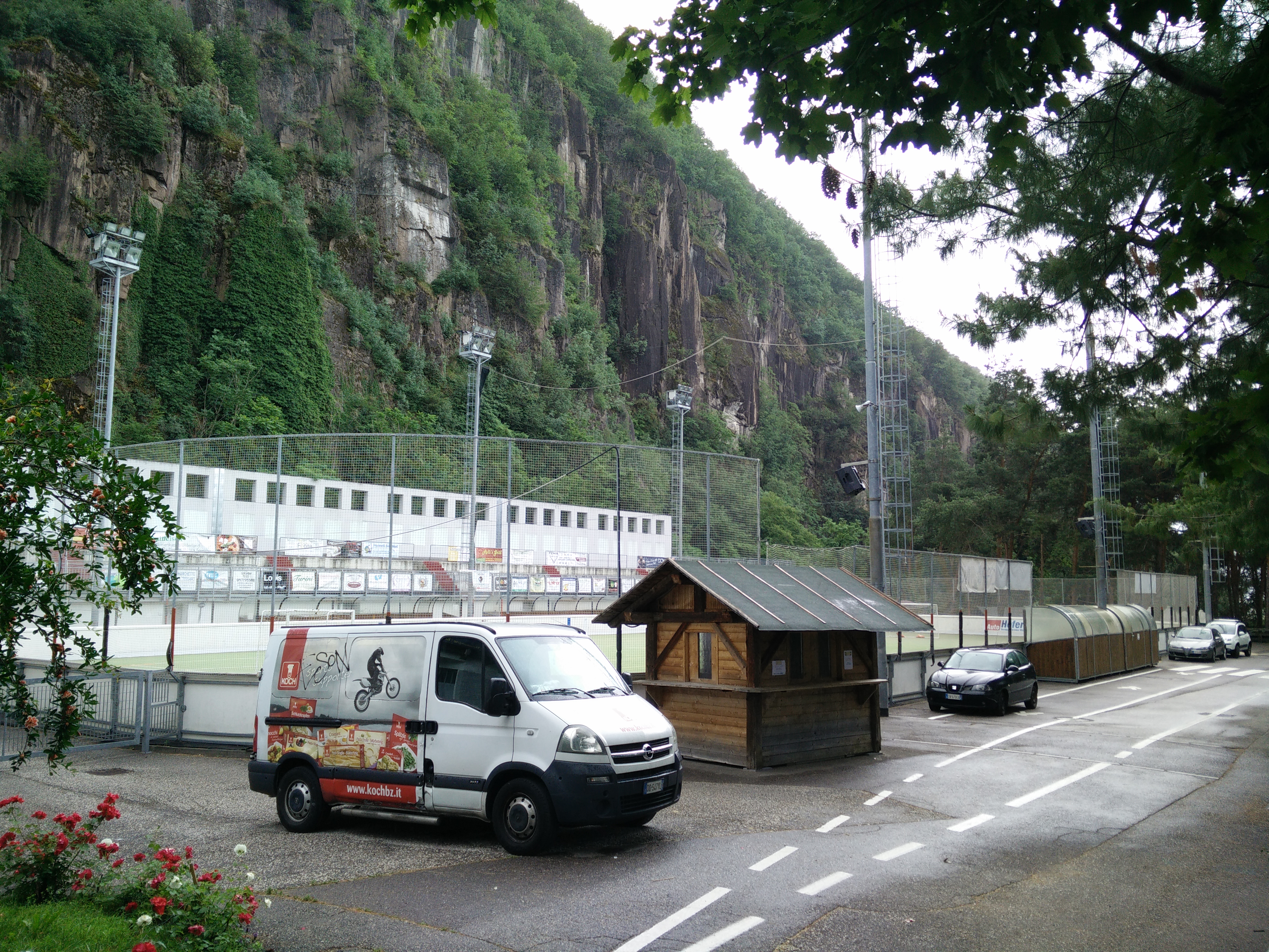 Stadio del ghiaccio di Laives, Italia